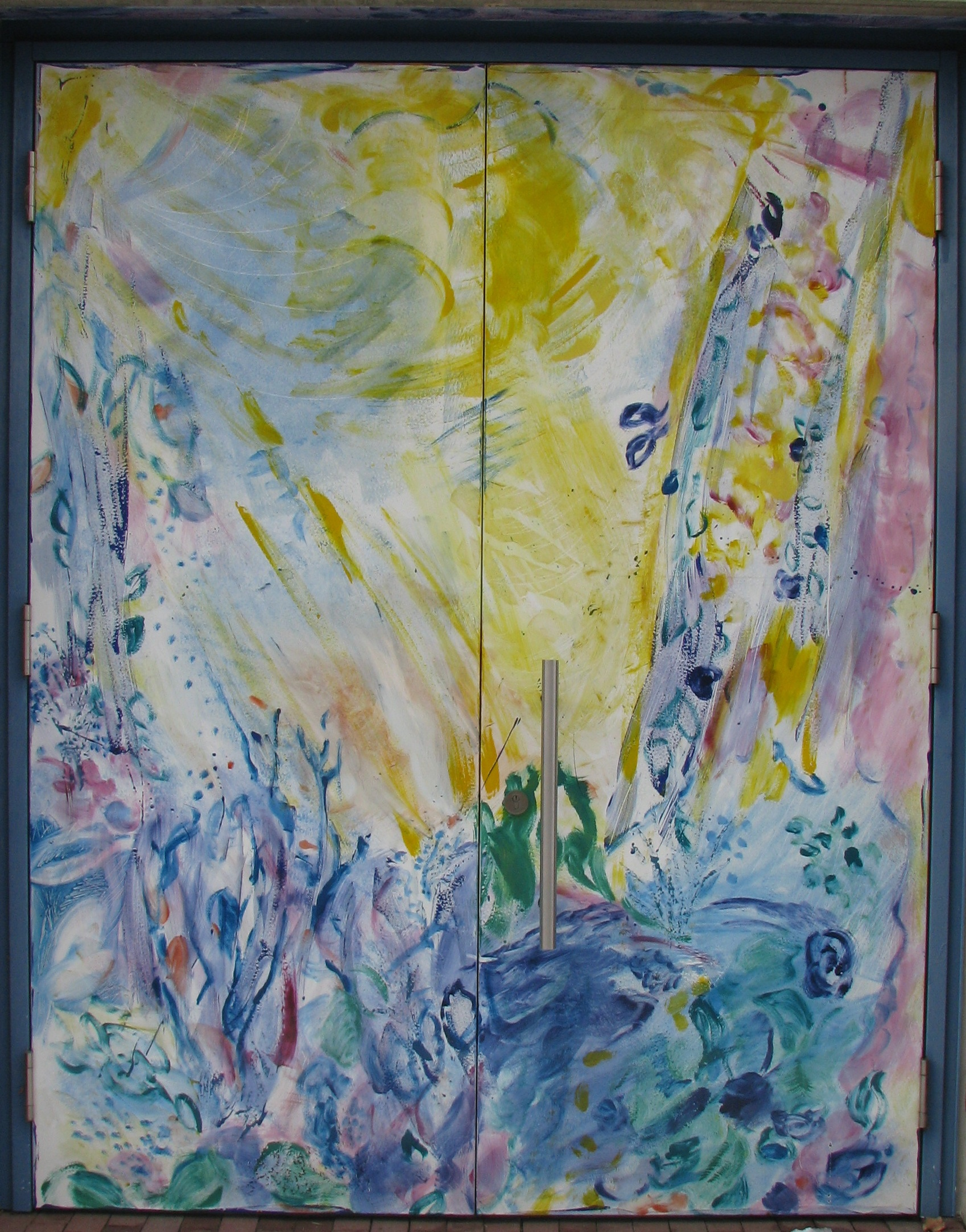 Kath. Kirche St. Teresa in Heidelberg-Ziegelhausen, erbaut 1995-97: Portal von Hanspeter Münch